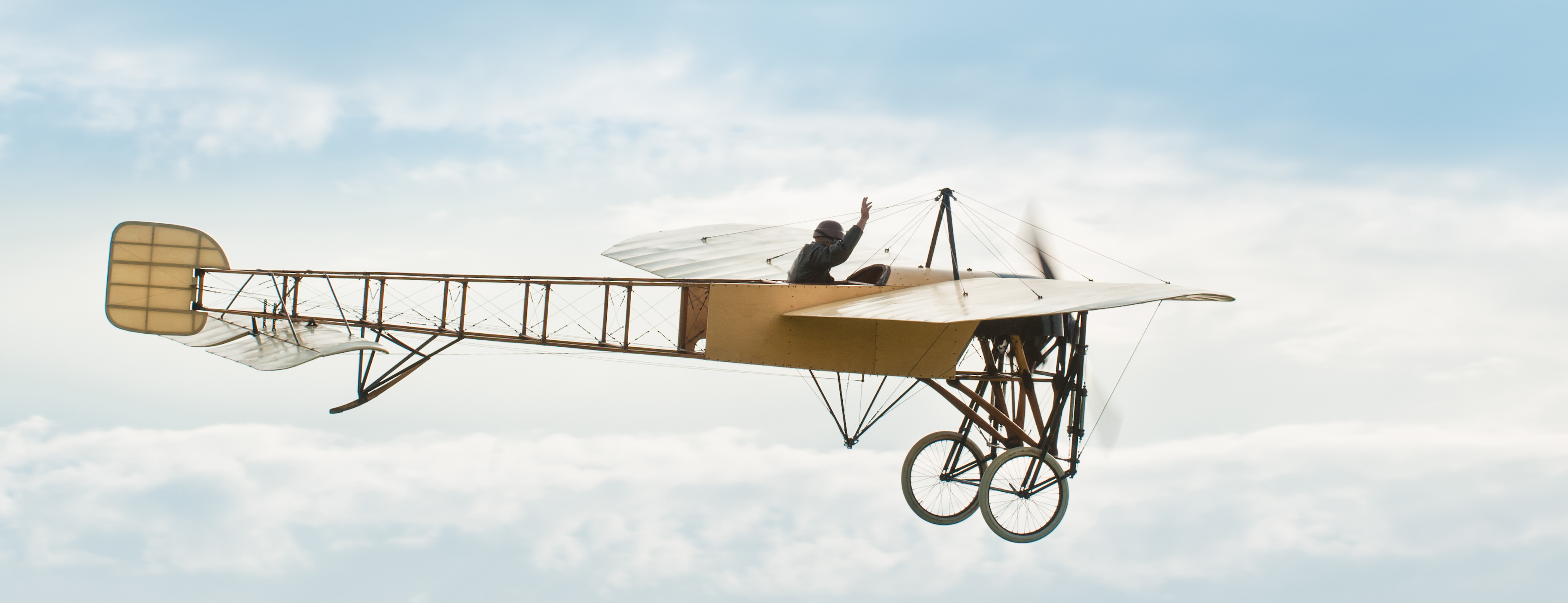 Eine Blériot XI, geflogen von Mikael Carlson beim Oldtimer Fliegertreffen, Flugfeld Hahnweide, Germany.